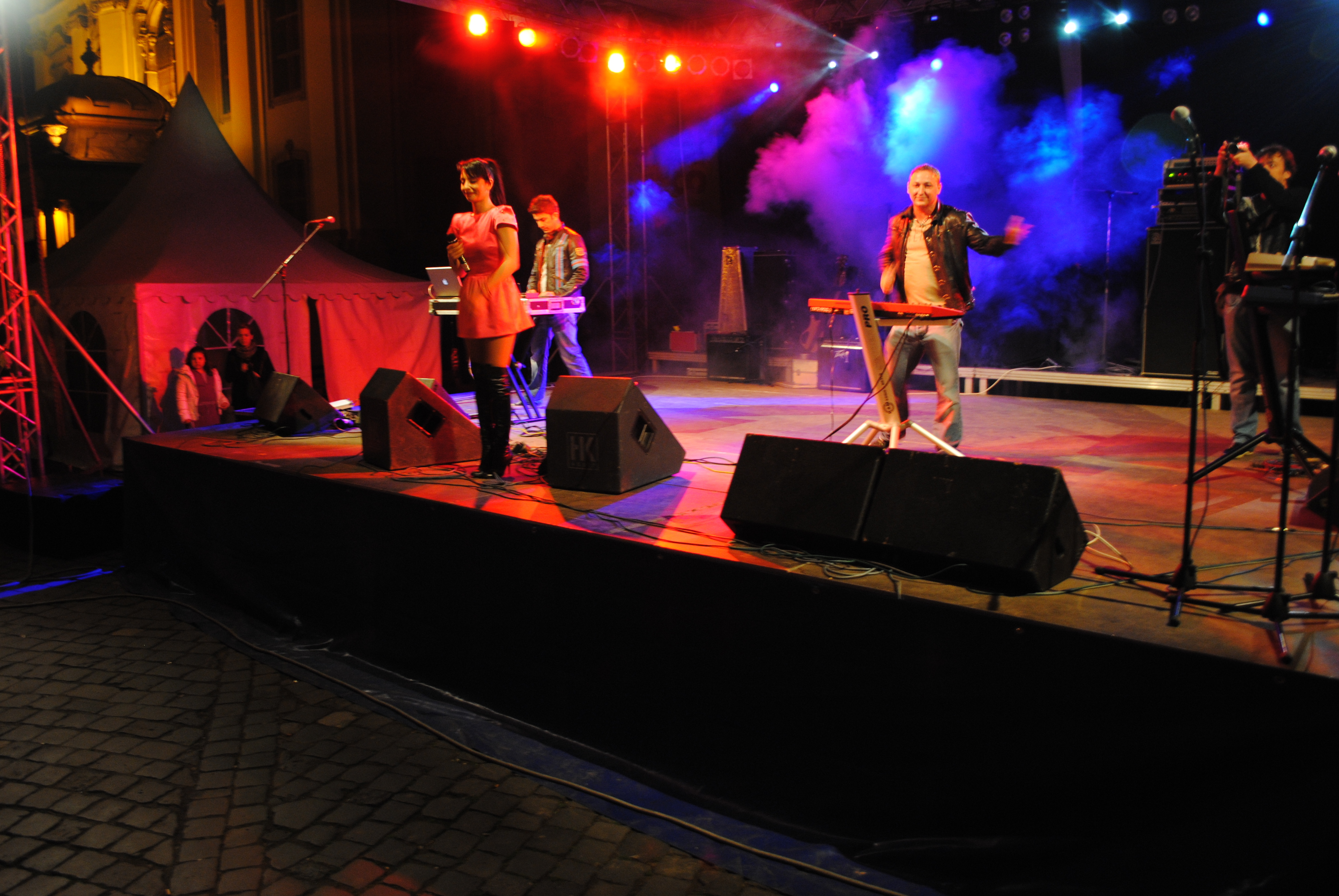 Concert DJ Project in Pta Unirii, Timisoara